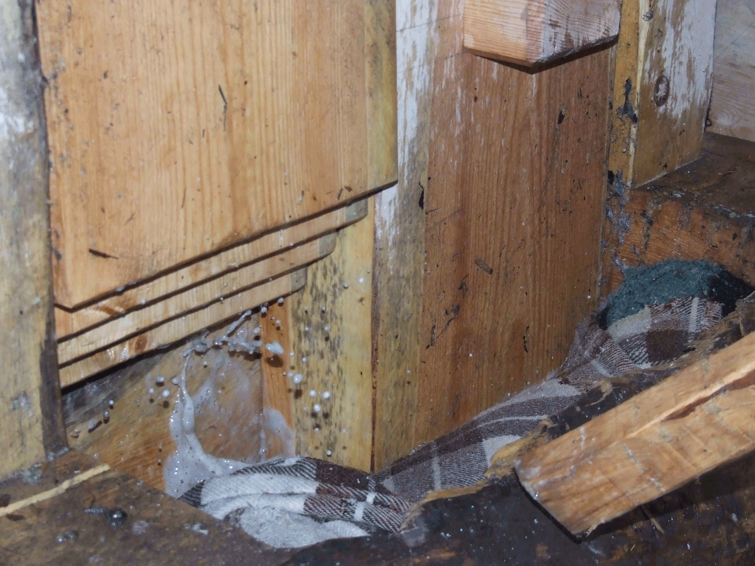 Stokkene som stamper tøyet